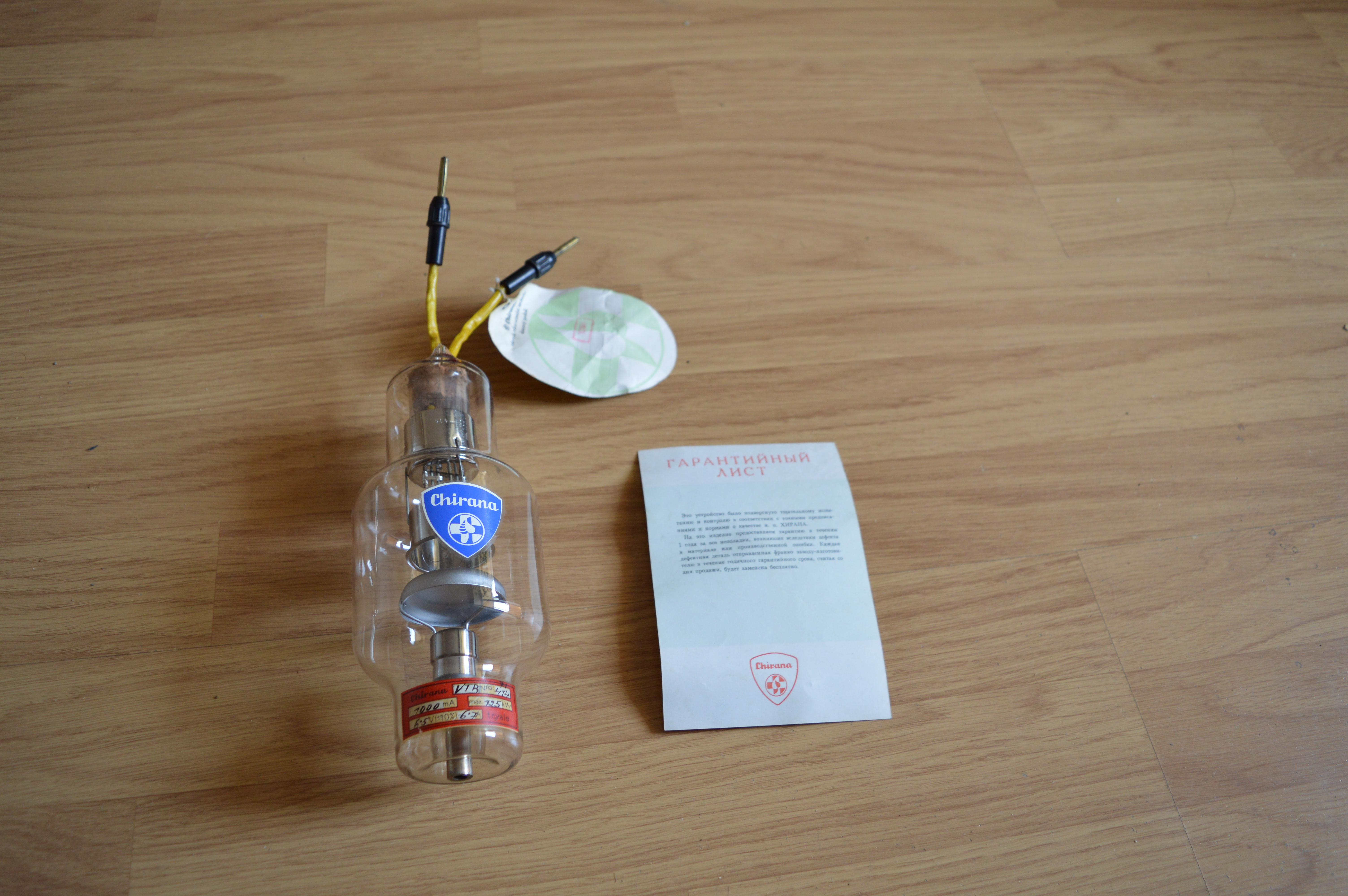 Кенотрон - вакуумный диод. Высоковольтный. Судя по рабочему току 1000 мА - это импульсный высоковольтный кенотрон. При таких параметрах при работе излучает рентген. Самое вероятное применение - для рентгеновских аппаратов. Для выпрямления высоковольтного напряжения для питания рентгеновской трубки.